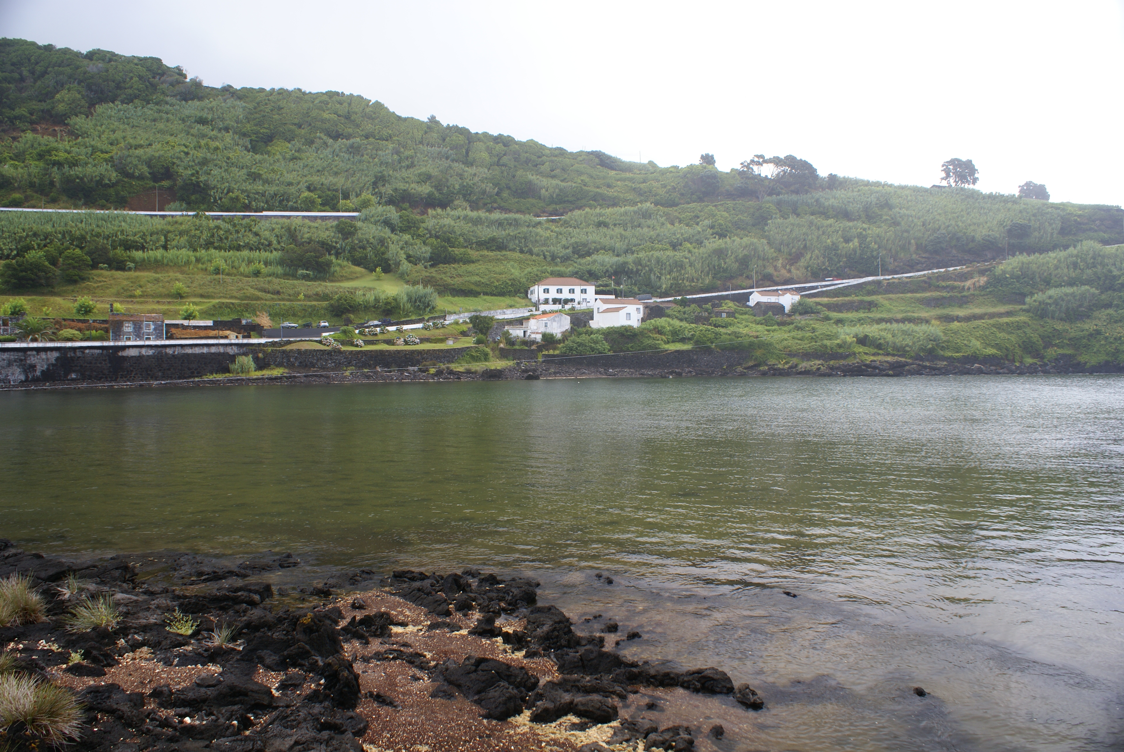 Zona de Protecção Especial para a Avifauna das Lajes do Pico, 2 Lajes do Pico, ilha do Pico, Açores, Portugal